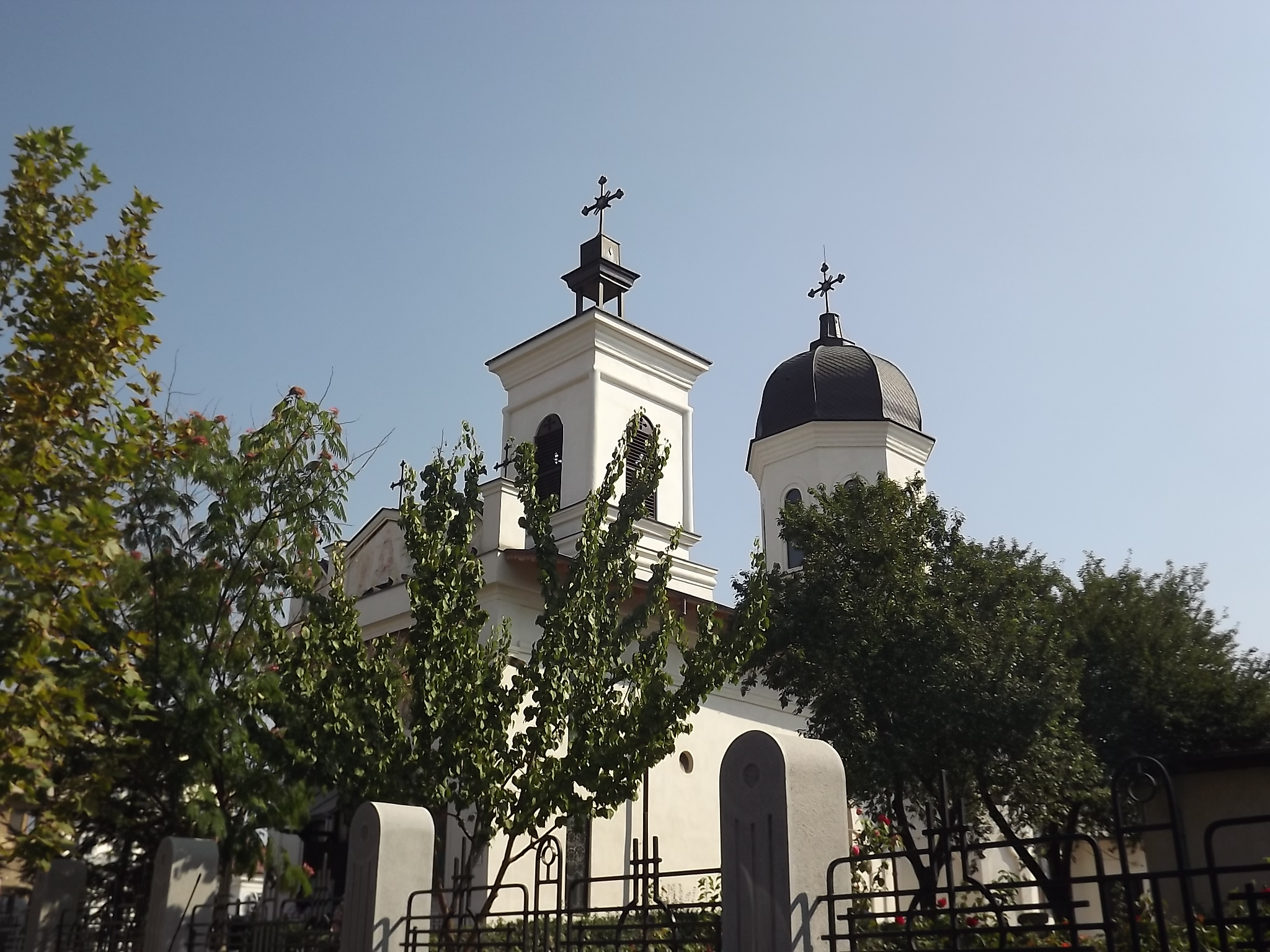 Biserica Dichiu - Tichirlești